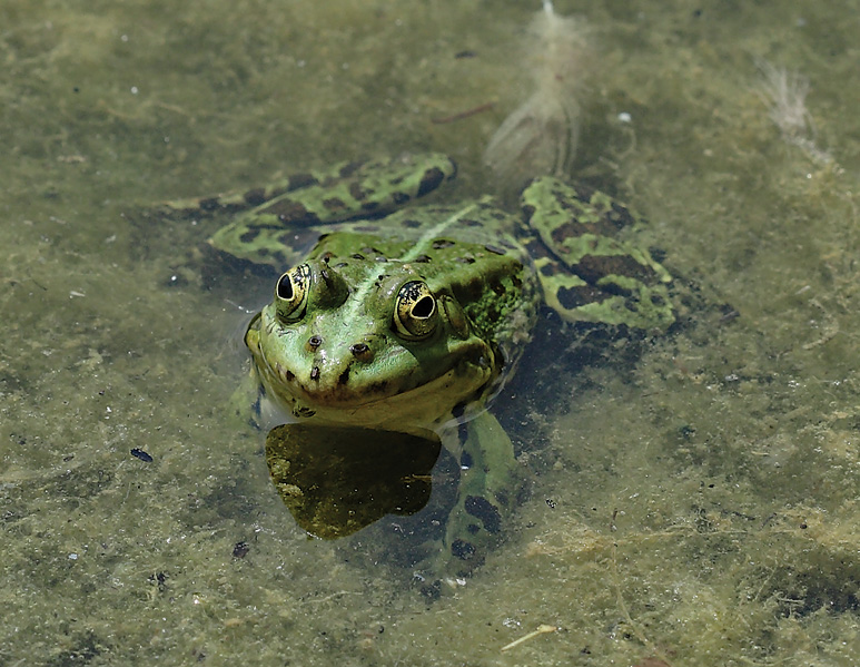 Seefrosch (Rana ridibunda) - Population nähe Bonn